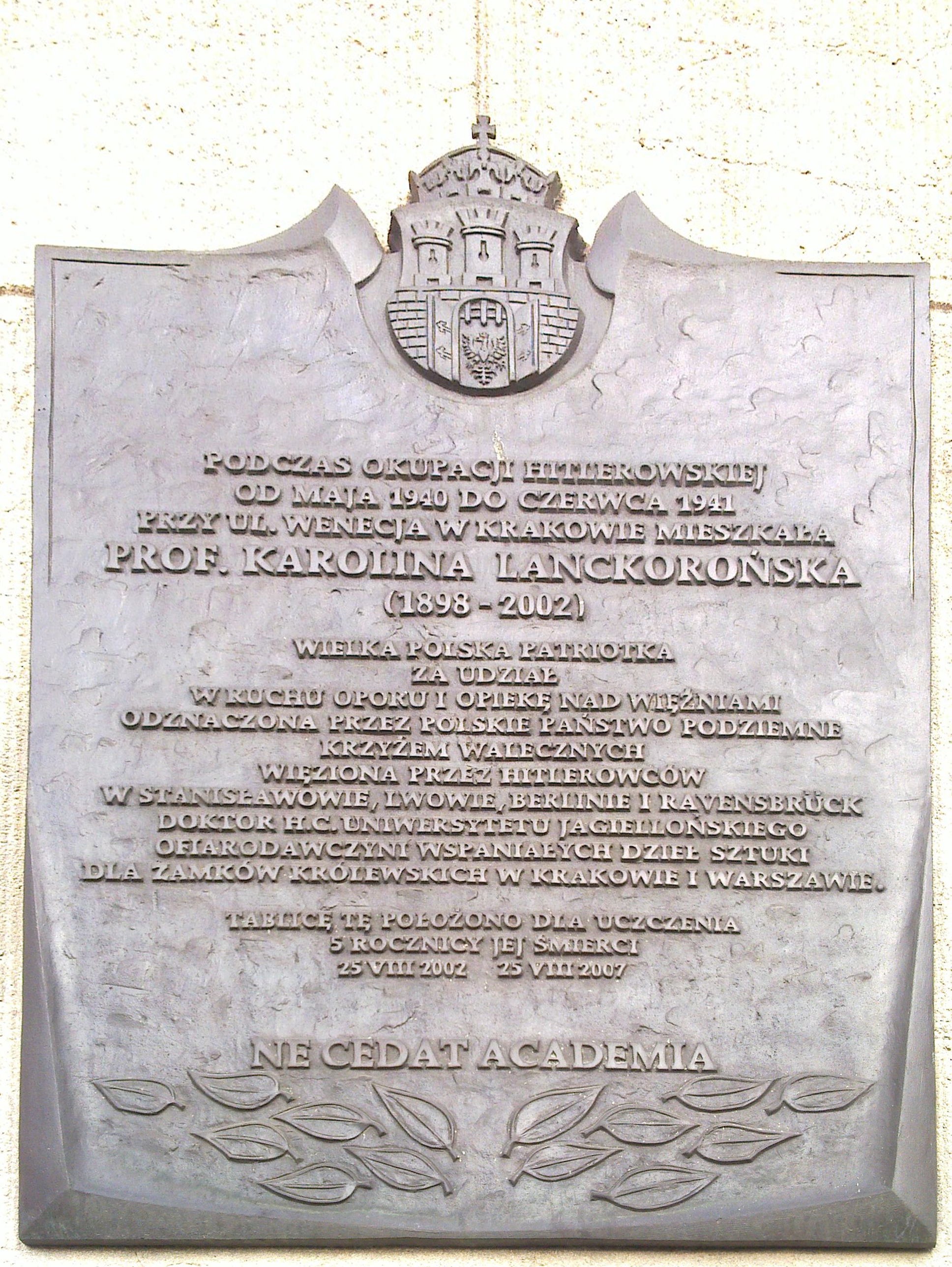 Tablica upamiętniająca prof. Karolinę Lanckorońską wmurowana w ścianę budynku przy ul. Wenecja 1 w Krakowie.